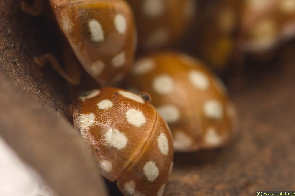 Sechzehnpunkt (Sechzehnfleck) Marienkäfer im Winter